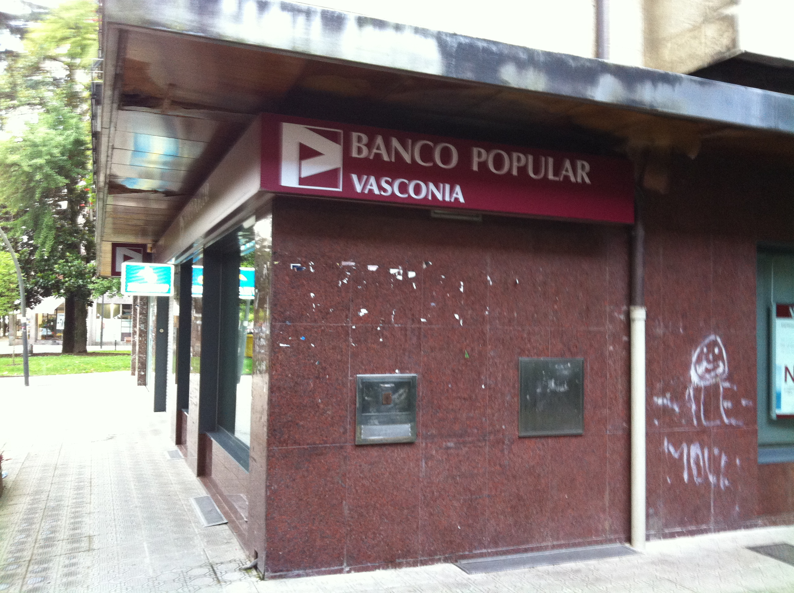 Banco Popular Vasconia a Tolosa